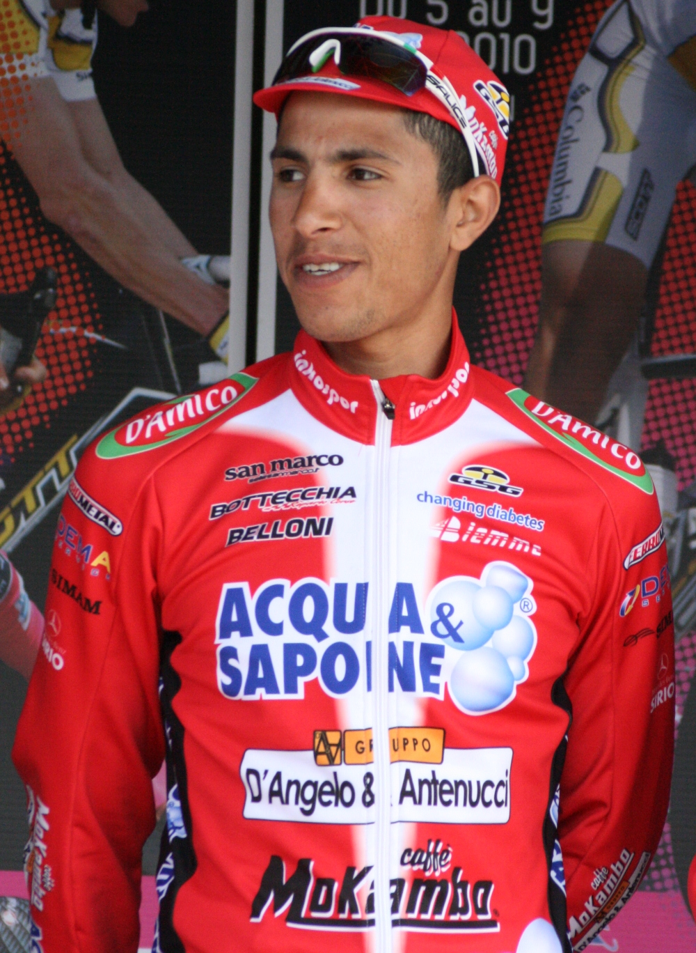 Rafaa Chtioui lors de la présentation des équipes des Quatre jours de Dunkerque 2010